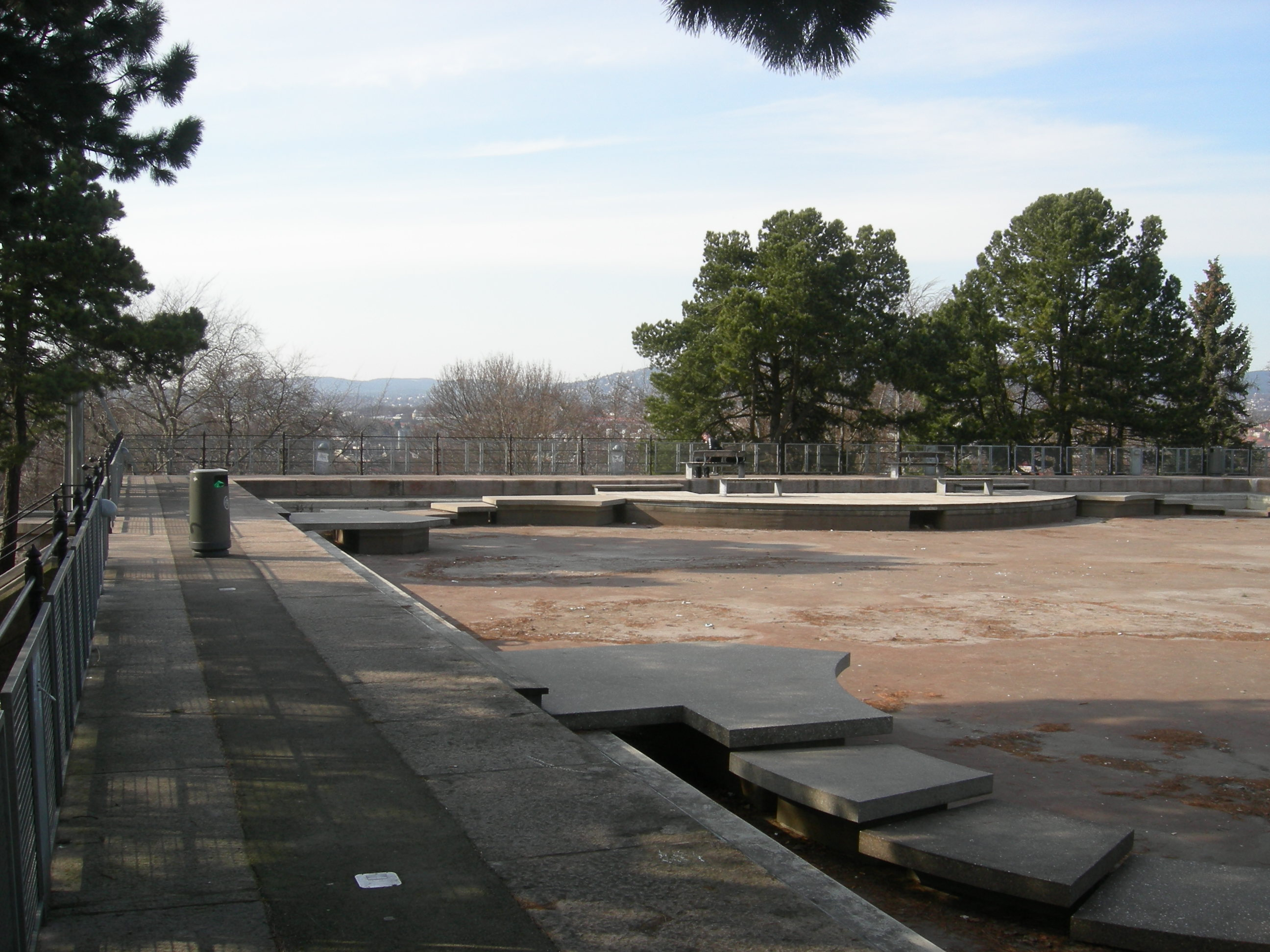 "Plaskedammen", Kampen park, Oslo, Norway